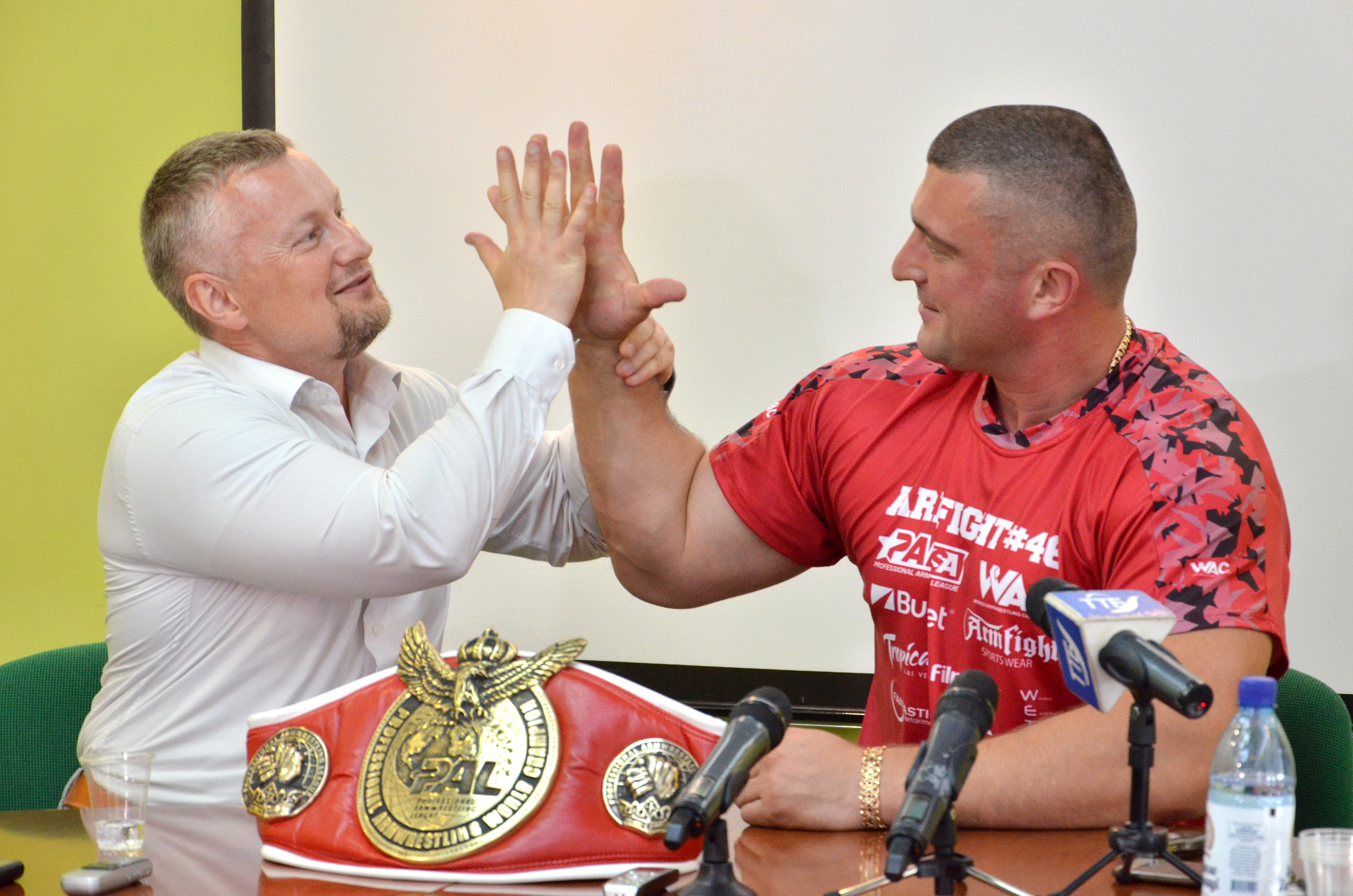 Українські спортовці, чемпіони світу, багаторазові чемпіони та призери чемпіонатів України Віктор Мацикур і Андрій Пушкар під час пресконференції.